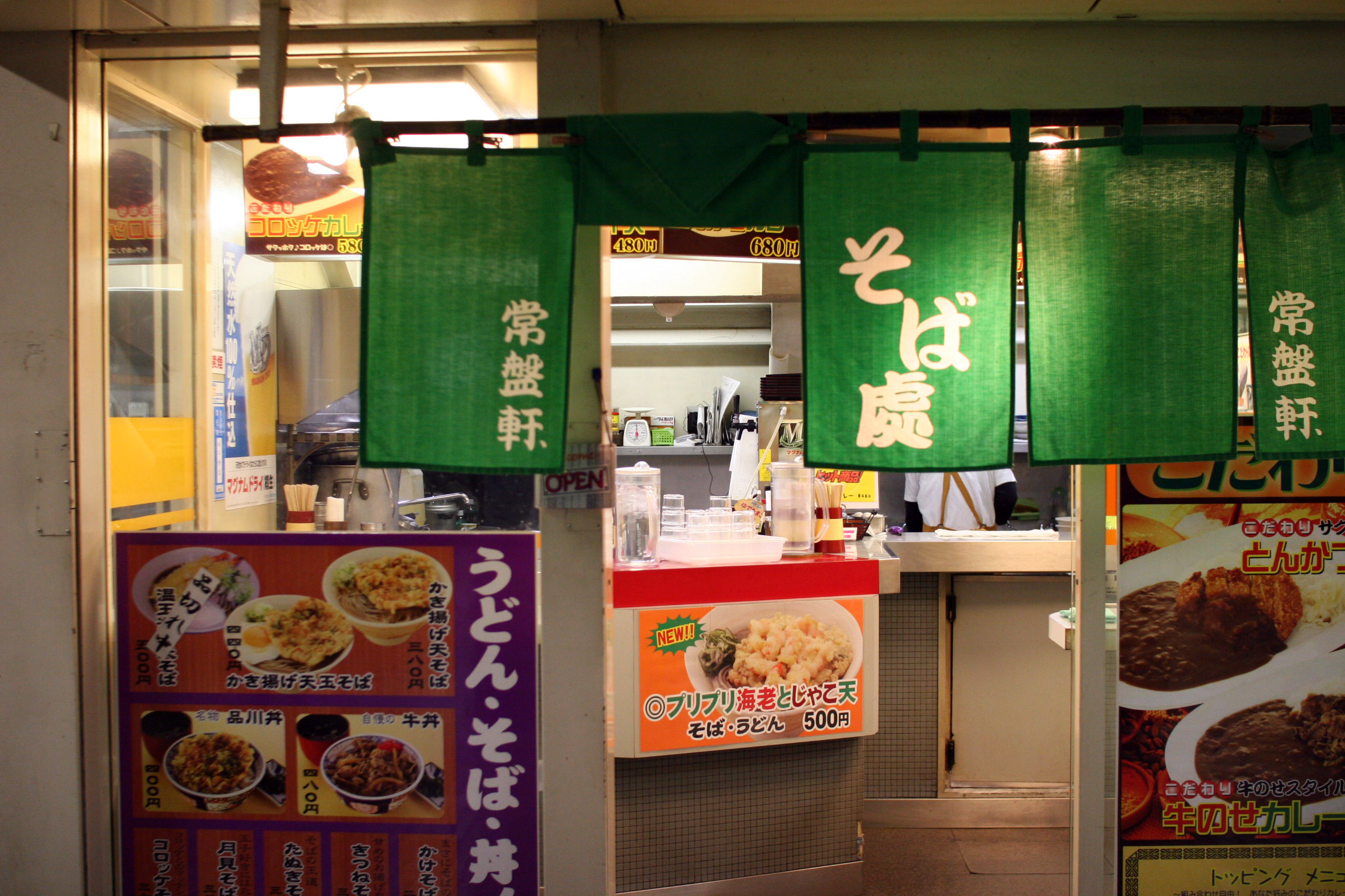 Udon Shop at Shinagawa Station